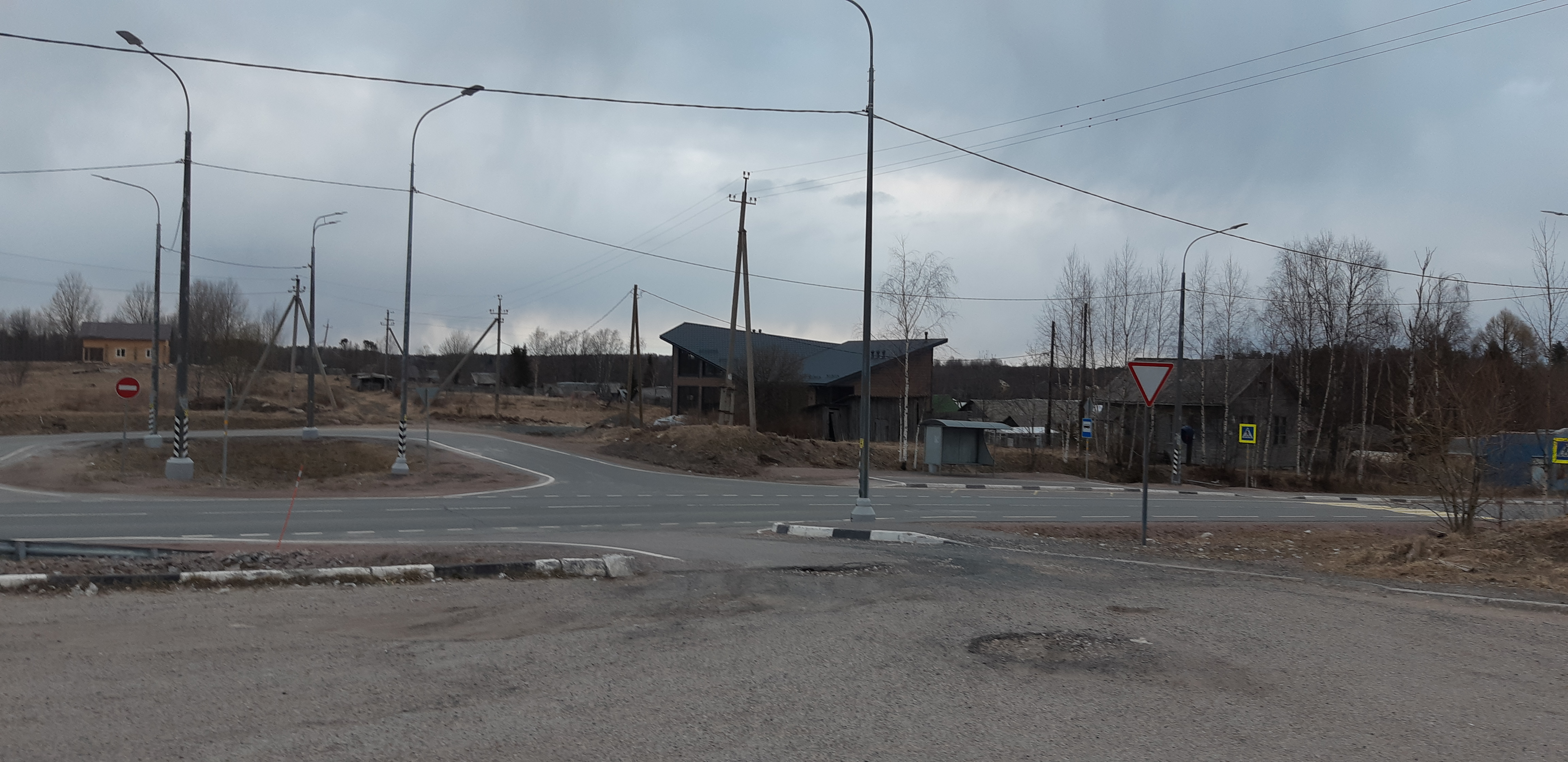 Колатсельга